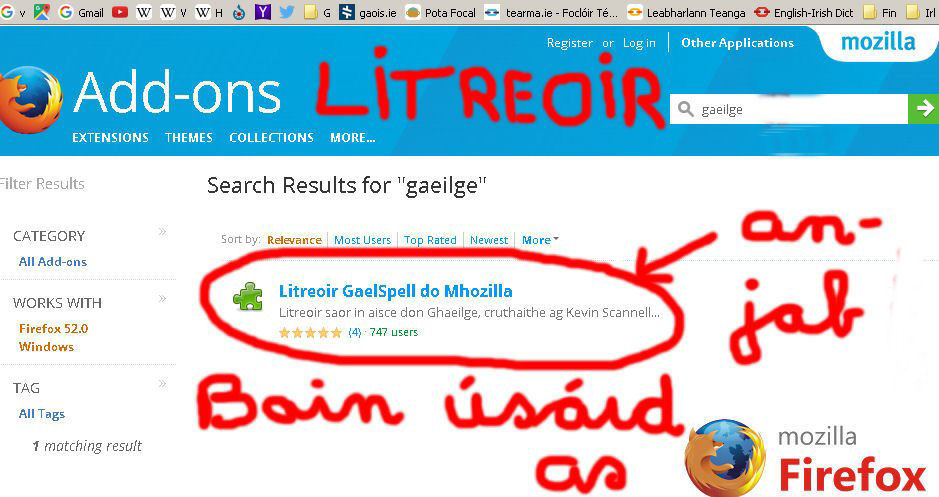 Gaelspell litriú Kevin Scannell Irish spell checker Gaeilge Firefox